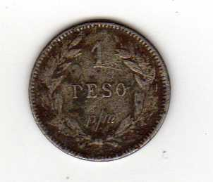 1 peso colombiano p/m de 1914 - Anverso